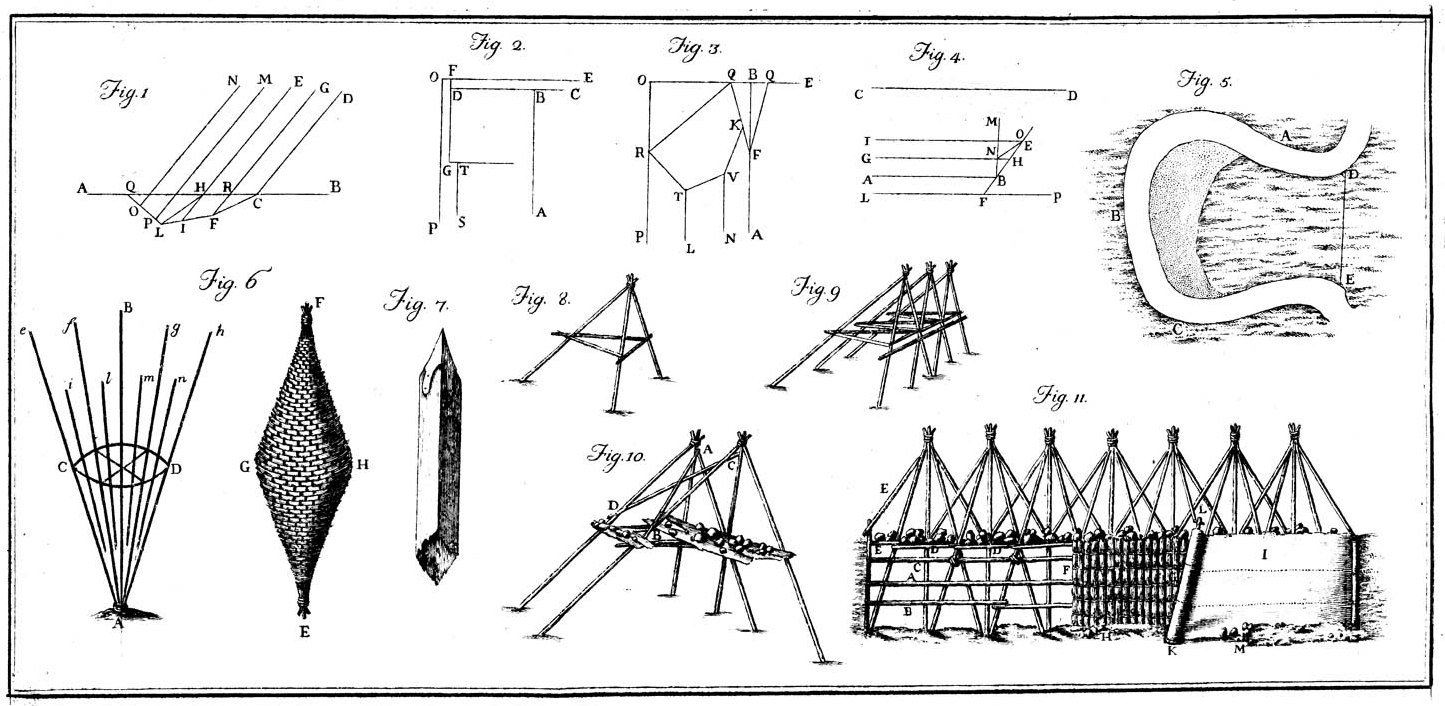 Strumenti per arginare l'erosione dei fiumi tratto da Delle corrosioni de' fiumi